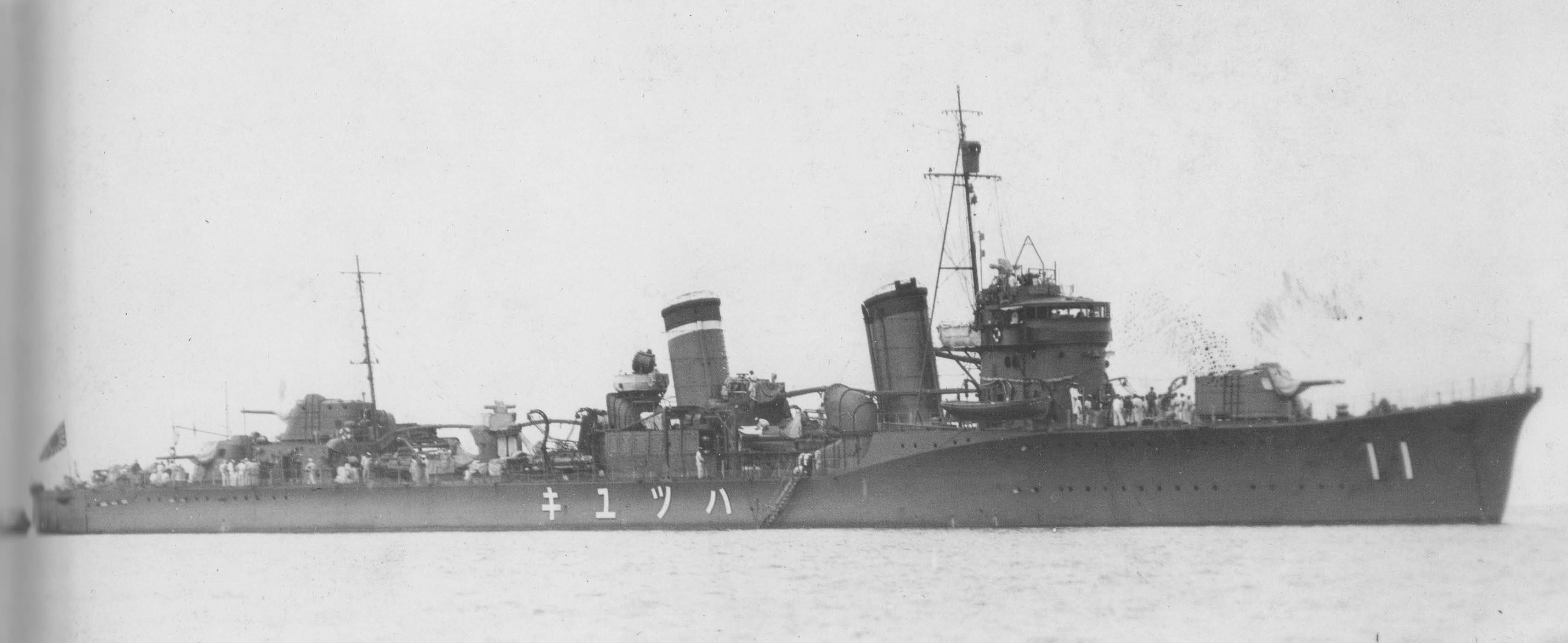 Japanese destroyer Hatsuyuki. Found here: [1]